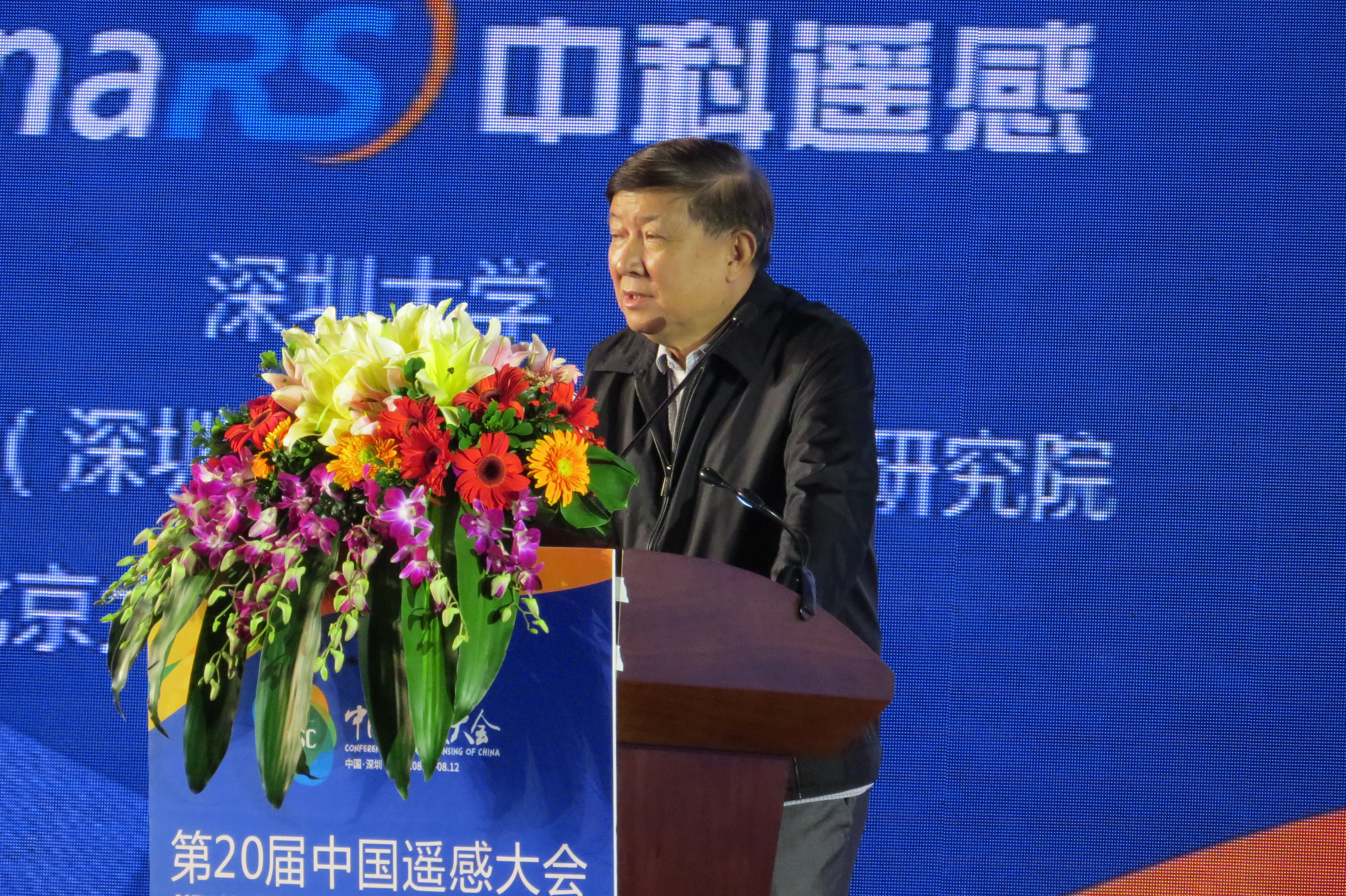 徐冠华院士报告：遥感与人类可持续发展-机遇与挑战